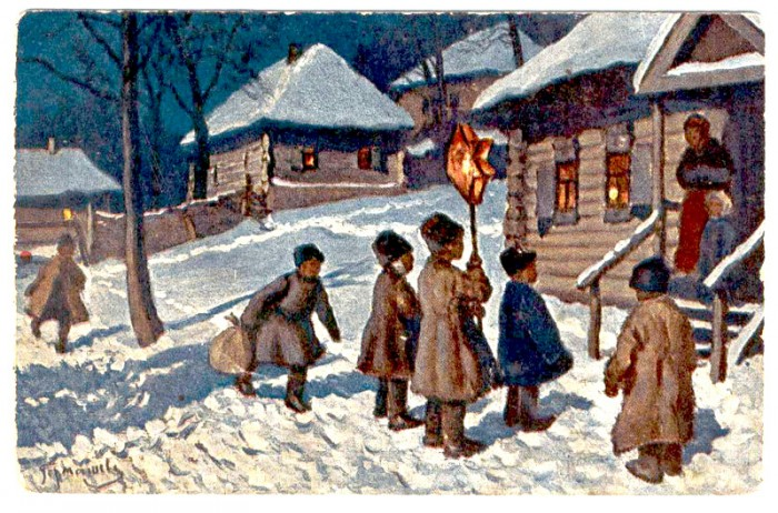 Репродукция с картины М. Гермашева «Со звездой». Издана фирмой «Ришар», отпечатана в типографии товарищества «Р.Голике и А.Вильборг». Петроград, 1916 г.